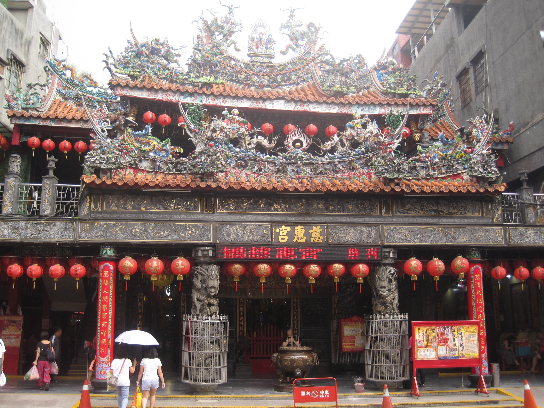 板橋慈惠宮